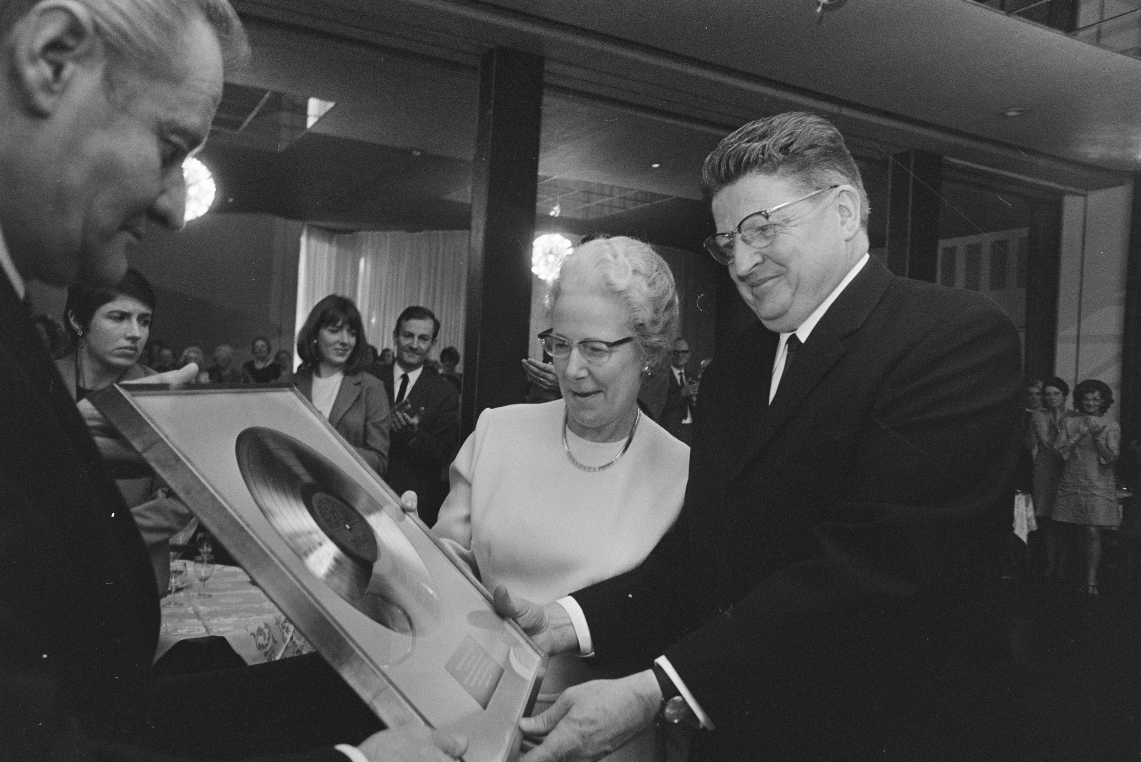 Collectie / Archief : Fotocollectie Anefo Reportage / Serie : [ onbekend ] Beschrijving : Pro Musica 25 jaar Lex en Mies Karsemeijer met gouden plaat Datum : 21 november 1968 Fotograaf : Kroon, Ron / Anefo Auteursrechthebbende : Nationaal Archief Materiaalsoort : Negatief (zwart/wit) Nummer archiefinventaris : bekijk toegang 2.24.01.05 Bestanddeelnummer : 921-8790